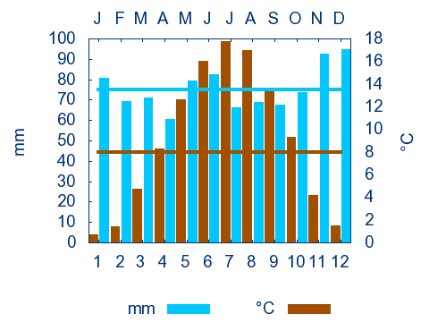 Klimadiagramm